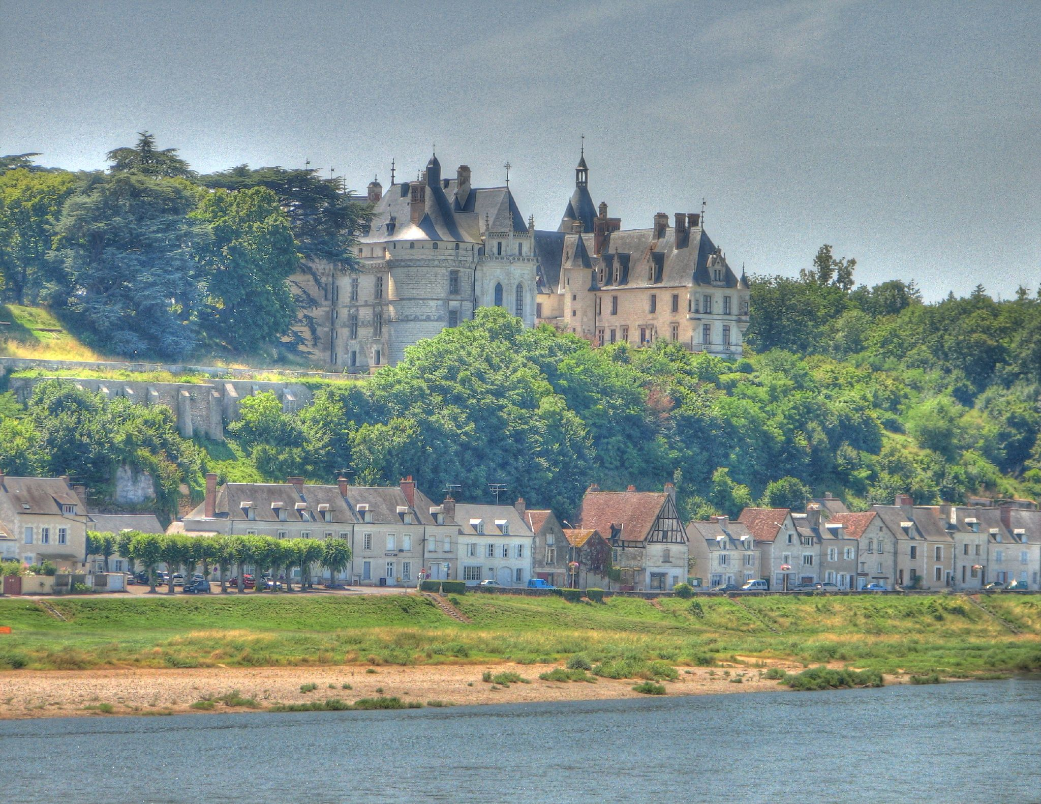 Chaumont-sur-Loire, Loir-et-Cher, France